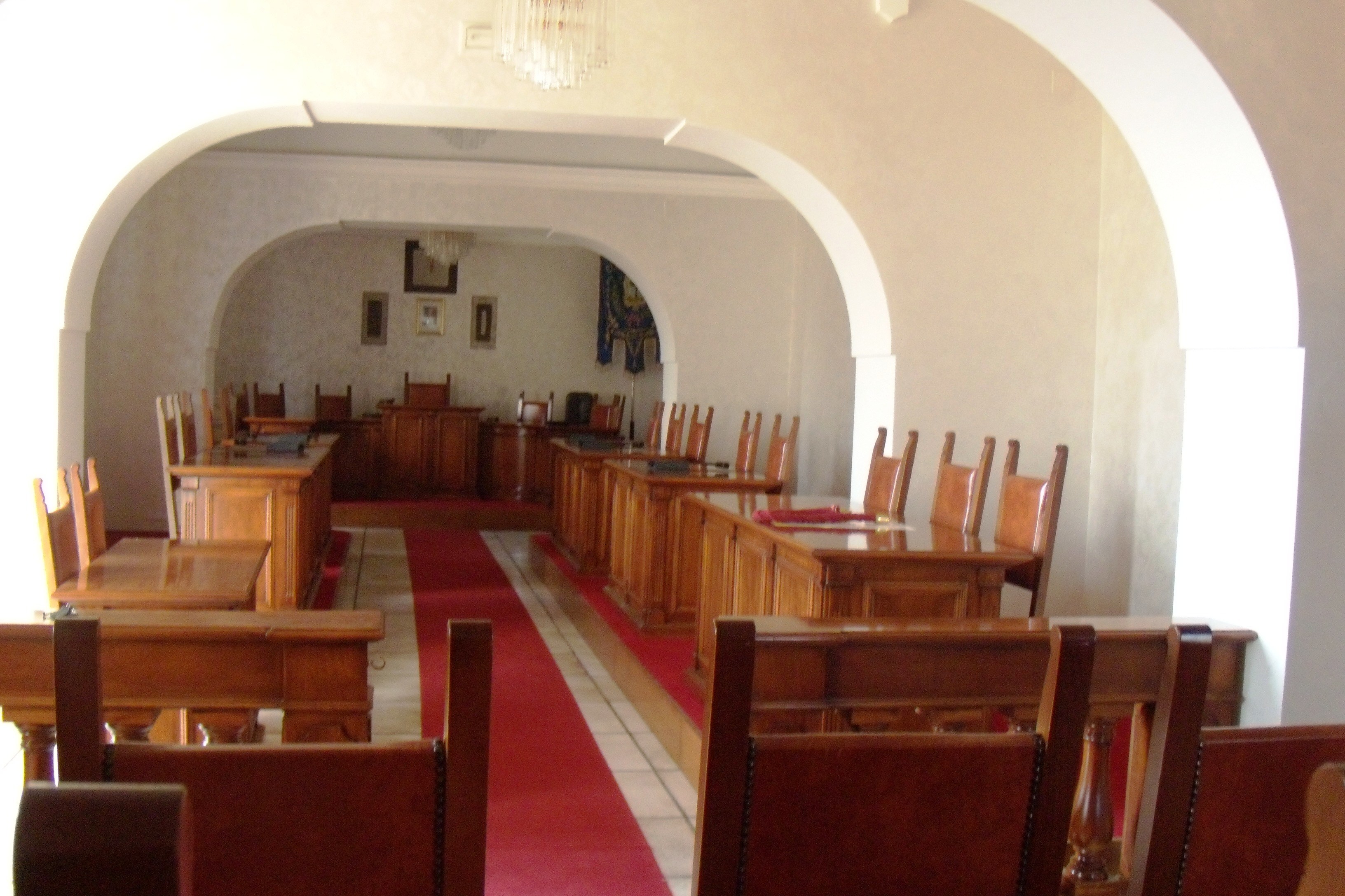 Scorcio della sala consiliare del comune di Cerreto Sannita (Italia).